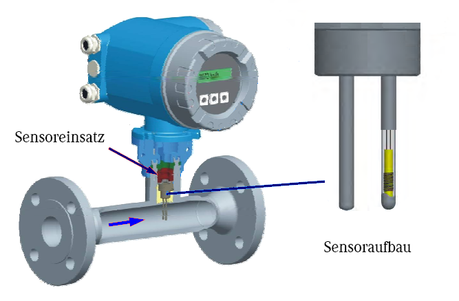 Kalorimetrisches Messprinzip Sensoraufbau